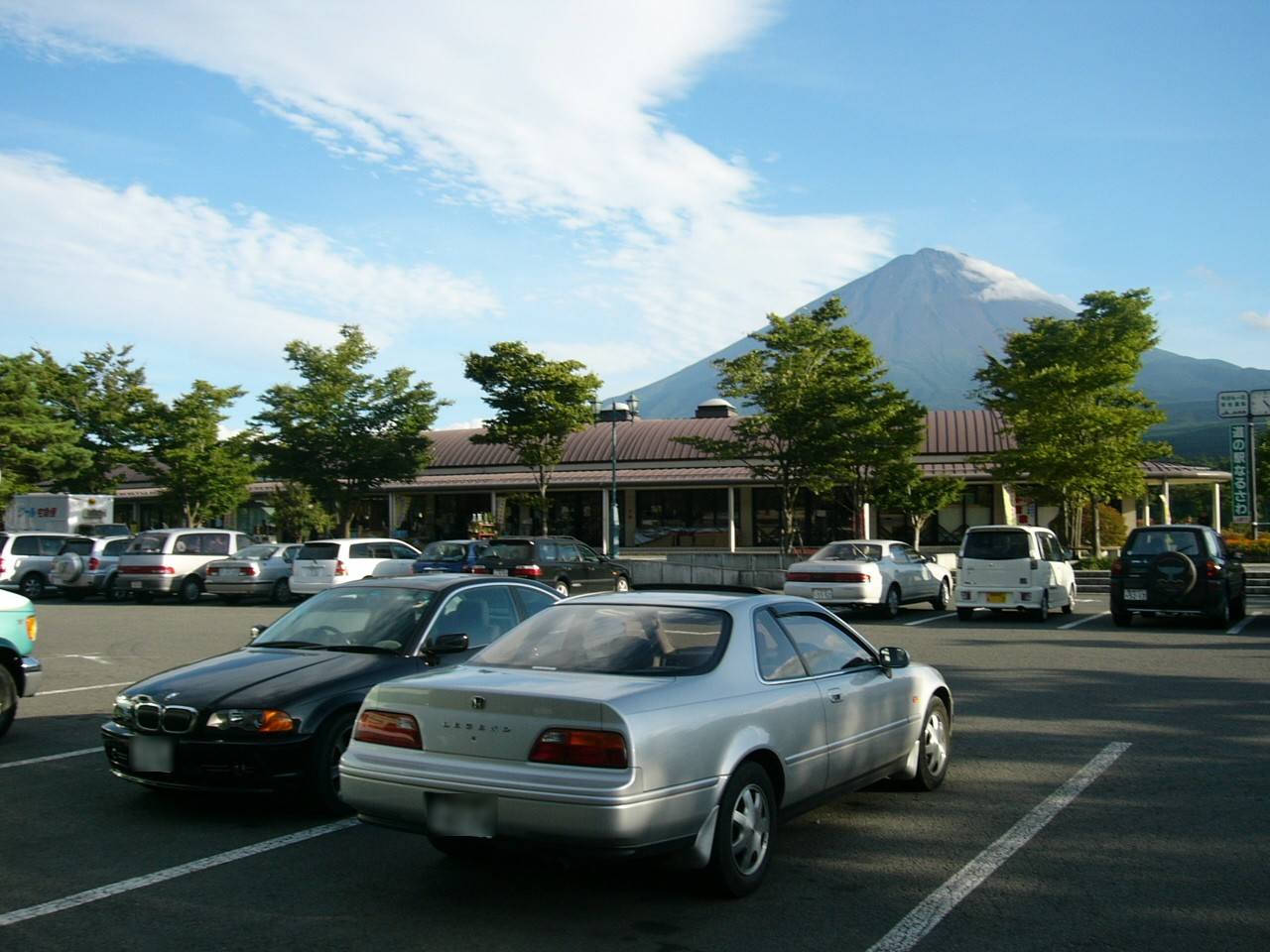 Michinoeki Narusawa (道の駅なるさわ Yamanashi)